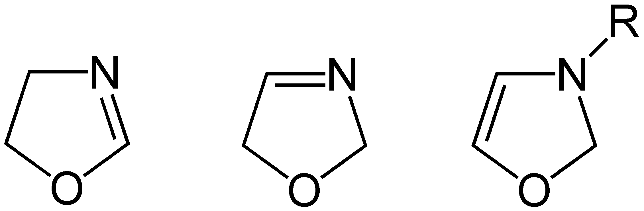 Chemische Formeln: Isomere 2-Oxazoline, 3-Oxazoline und 4-Oxazoline (von links nach rechts)